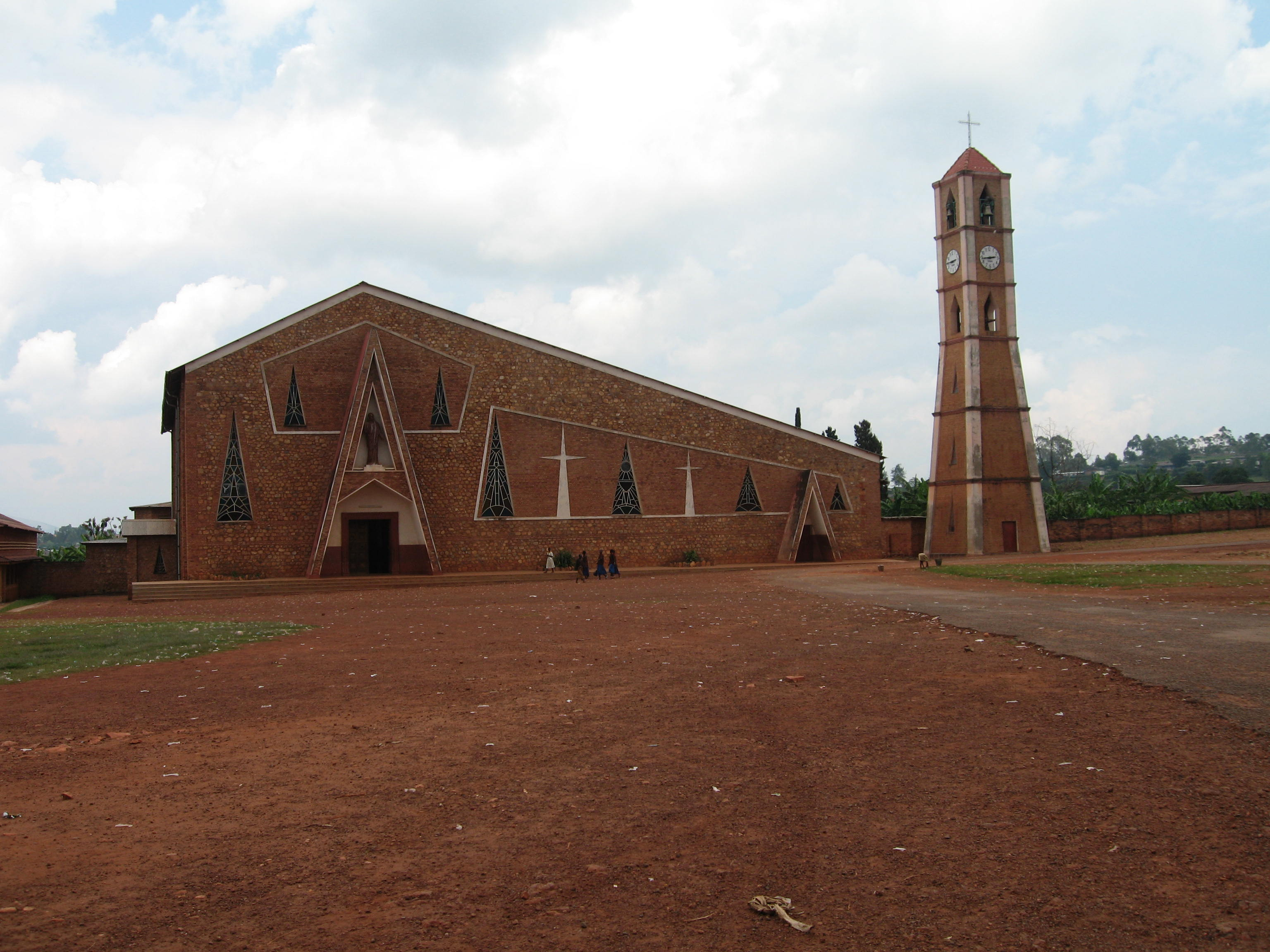 Iglesia en Gitega en el sector de La Mushasha. Burundi